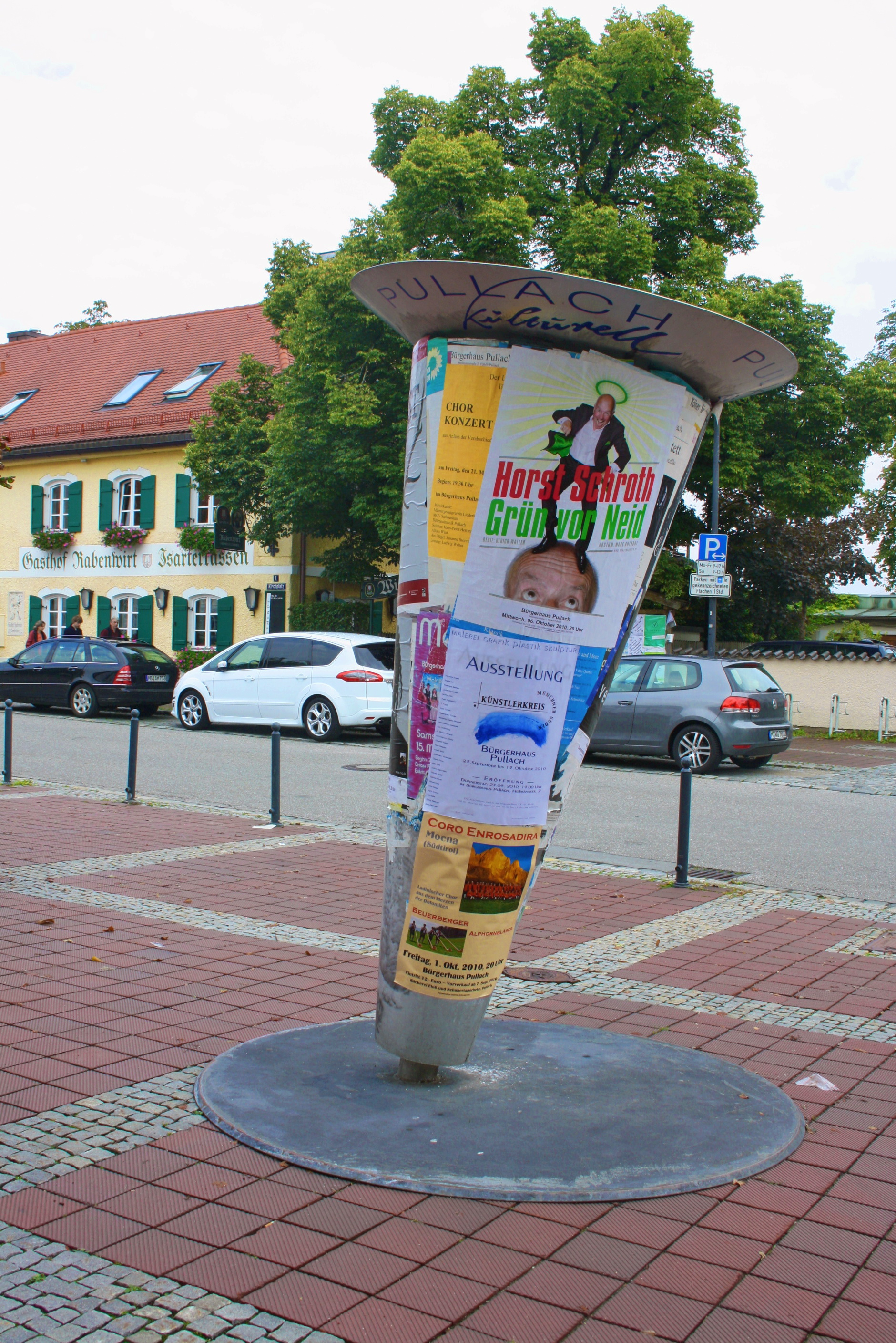 Litfaßsäule in Pullach im Isartal.